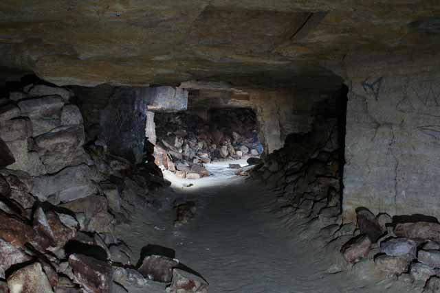 Odessa catacombs